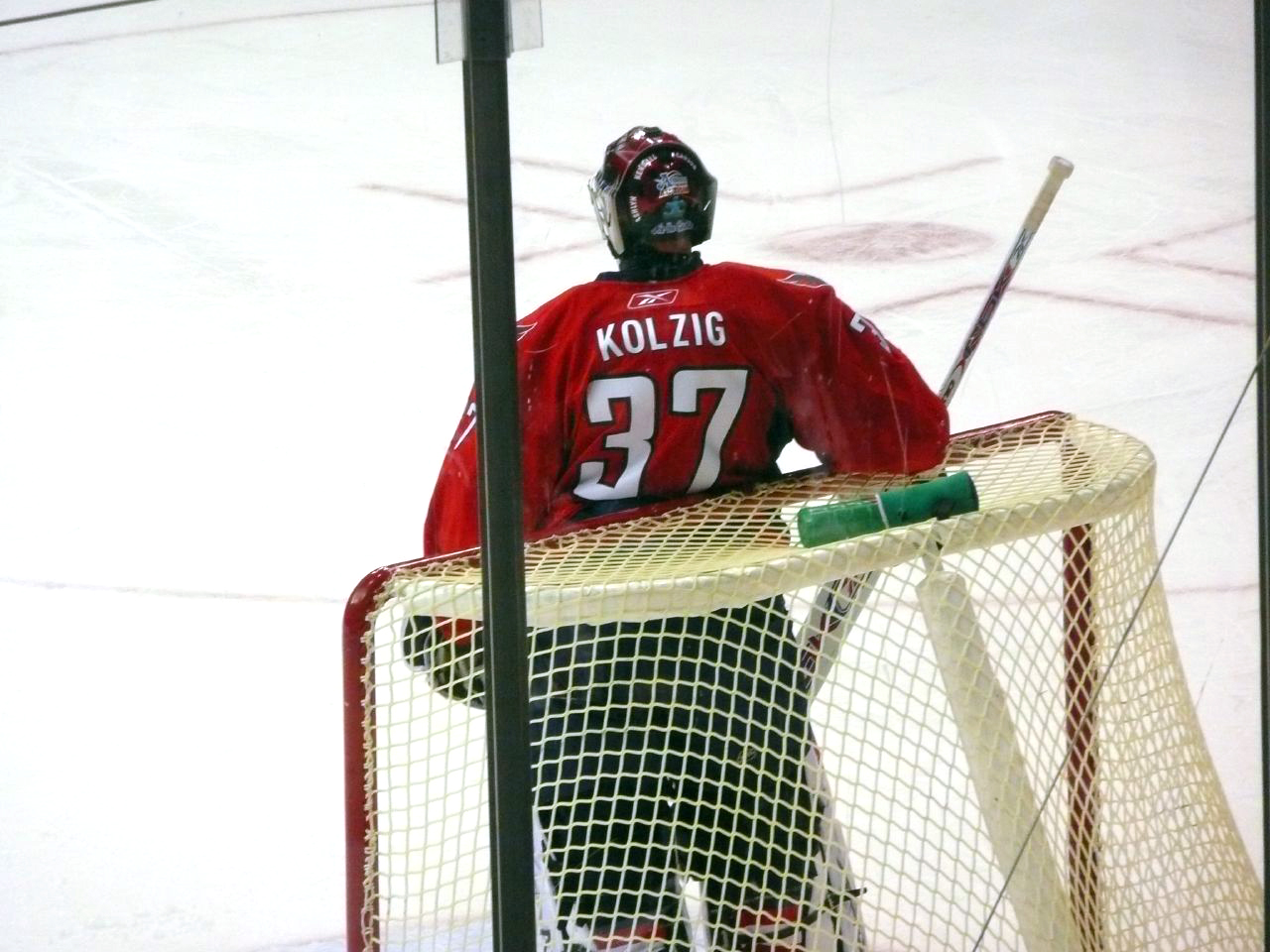 Olaf Kolzig